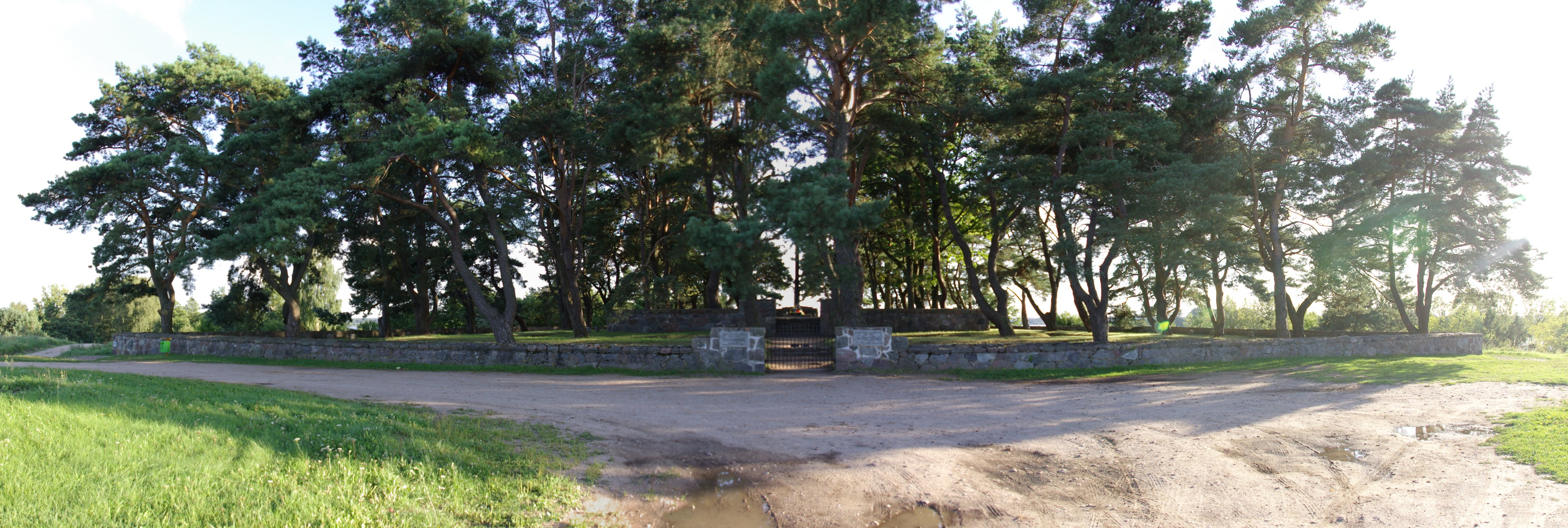 Węgorzewo: Cmentarz wojenny z I wojny światowej